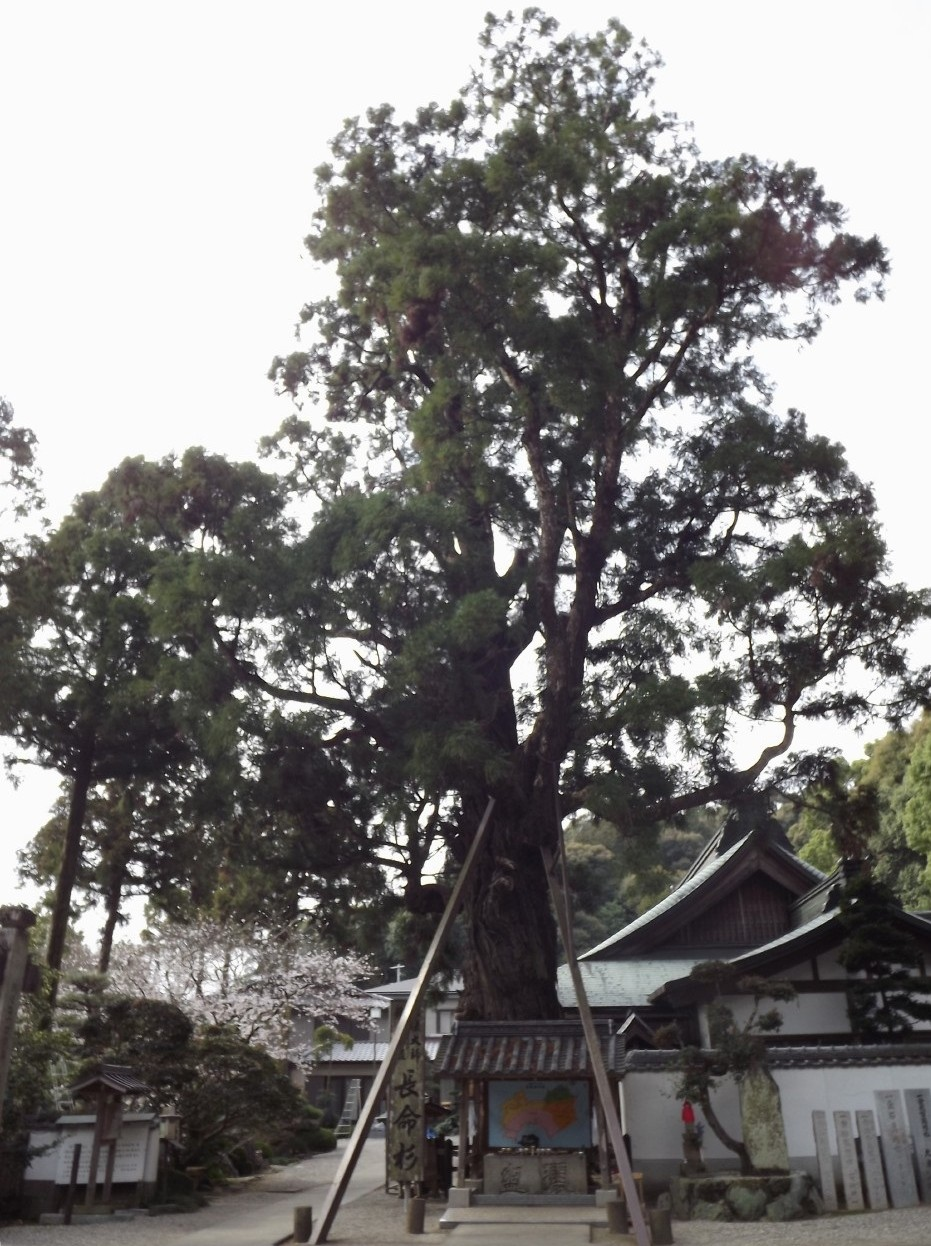 極楽寺の長命杉